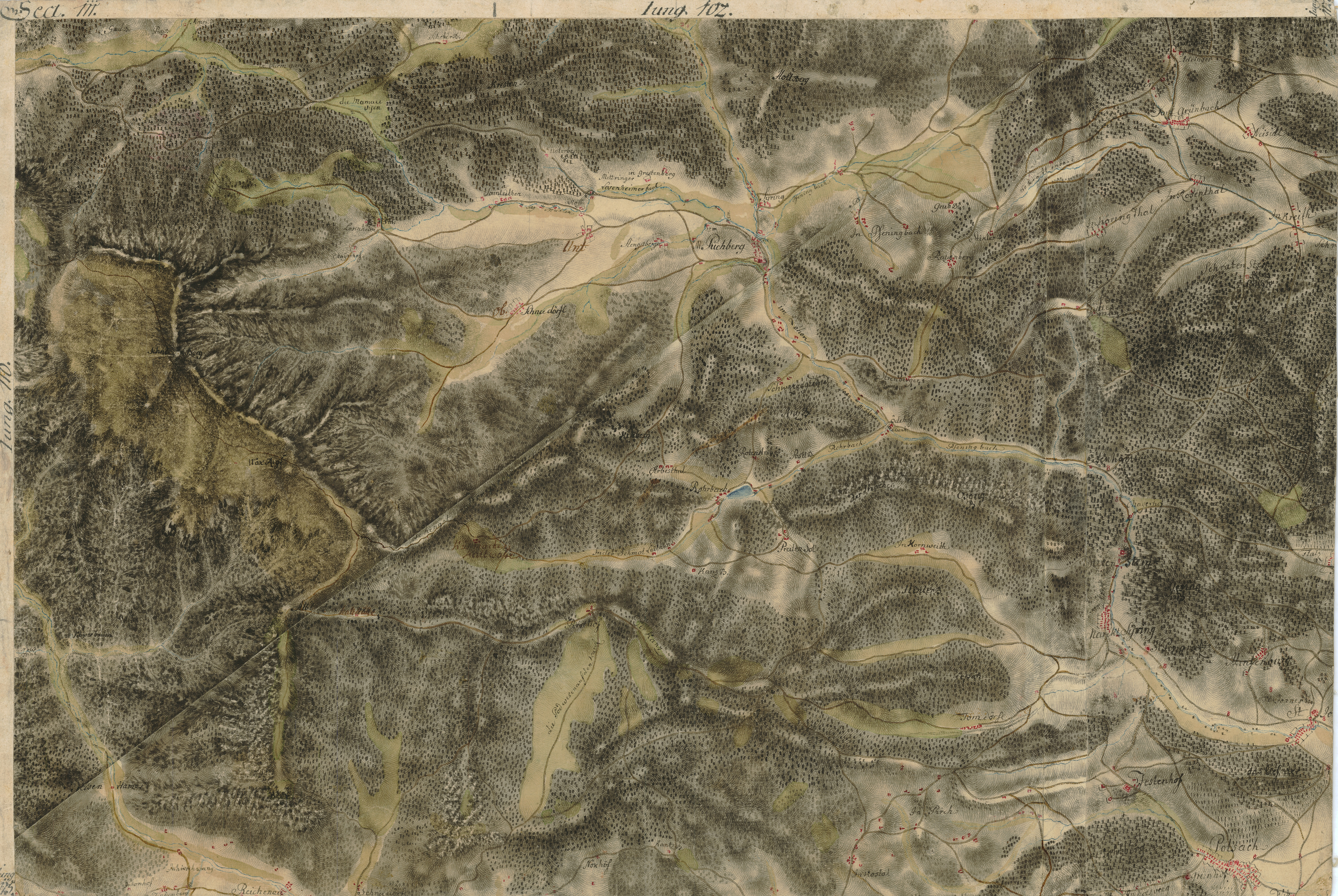 historische Landkarte BIXa242 sect.111c Josephinische Landesaufnahme: Puchberger Becken, Schneeberg,Schwarzatal in Niederösterreich, Österreich